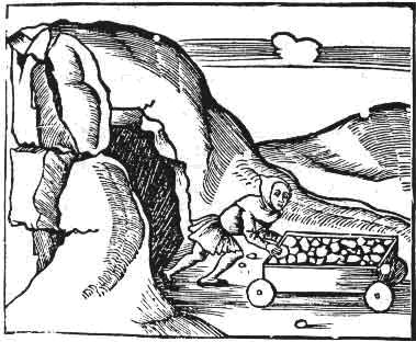 ’alchimista scava la terra. Scavare o penetrare la terra è il primo passo del processo alchemico. La terra è il corpo, o se stessi. Penetrare la terra corrisponde a penetrare, conoscere, il proprio sé interiore. (Text by Utente:WikiSysop)